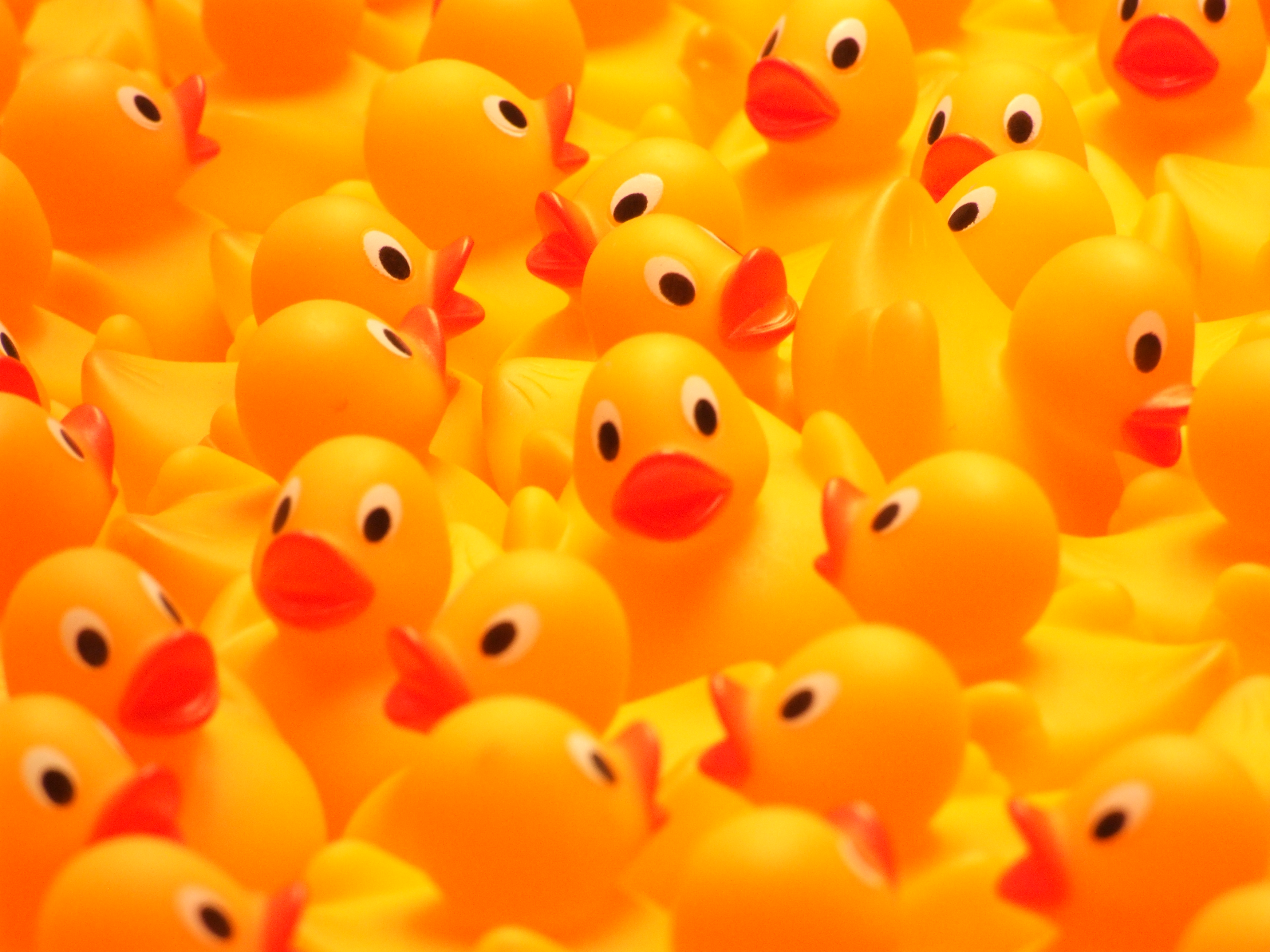 Rubber_duckies. ラバー・ダック。